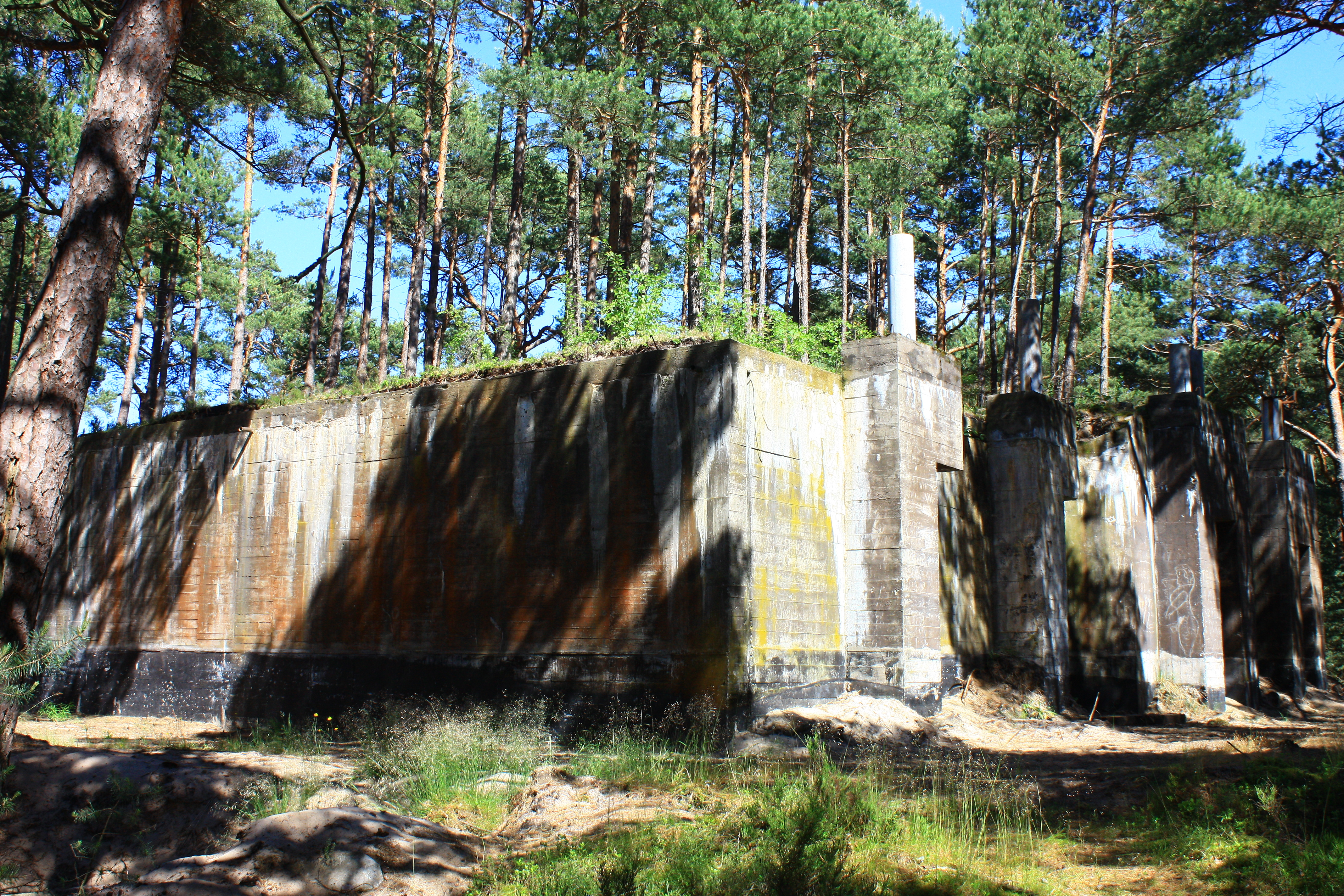 Hel, zespół fortyfikacji polskich rejonu umocnień "Hel", 1931-1939